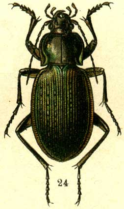 Сетчатый красотел Carabus gebleri